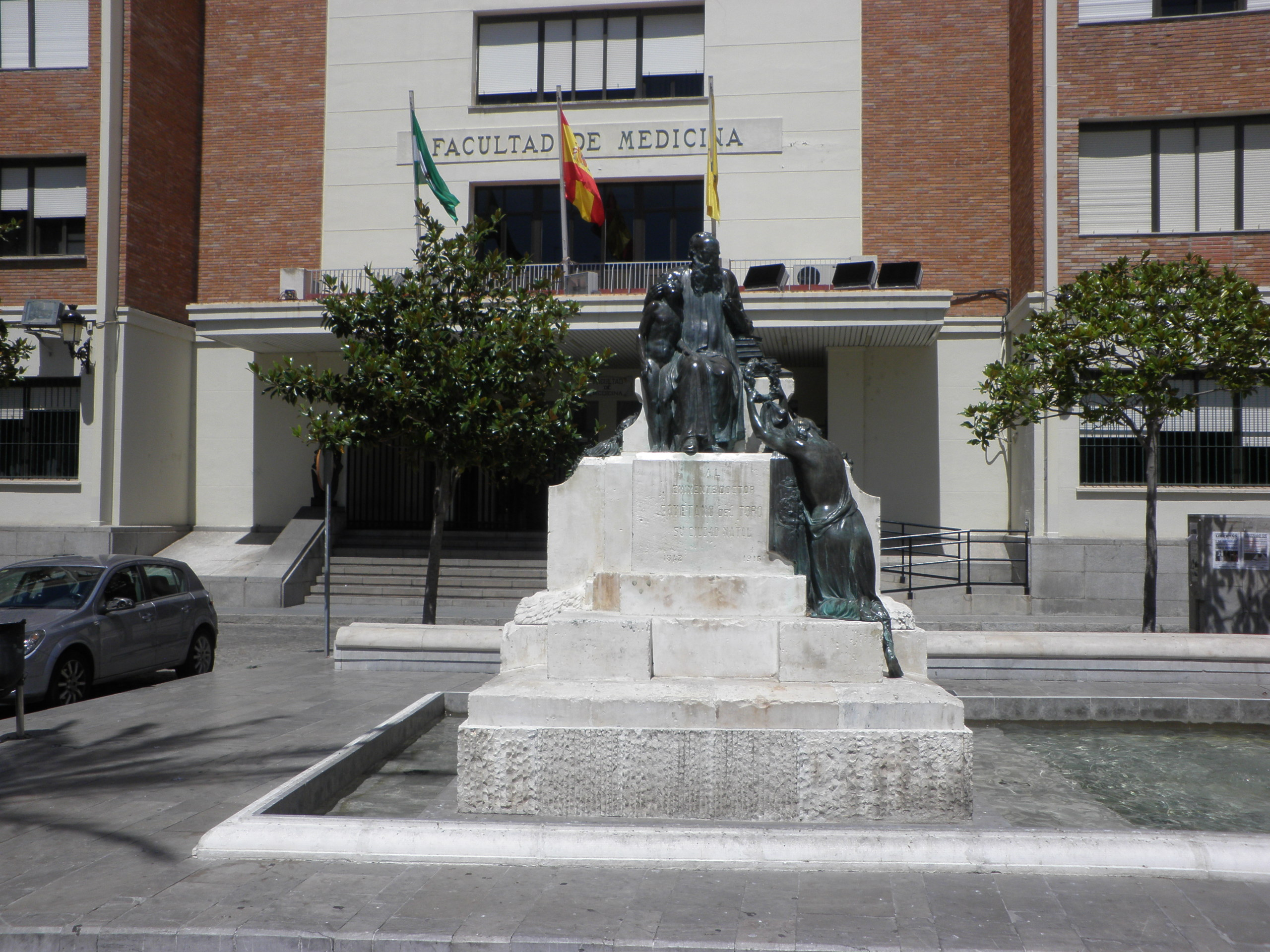 Facultad de Medicina, Universidad de Cádiz, España.